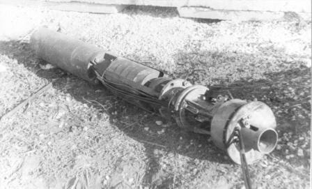 погружной электронасос ЭЦВ-10 в сборе с устройством беструбного водоподъема УБВ-10 перед монтажем в скважину